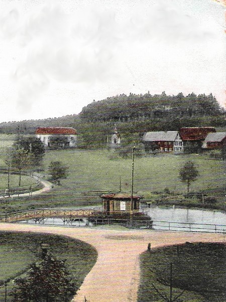 Kaple svatého Josefa v Mikulášovičkách (počátek 20. století)